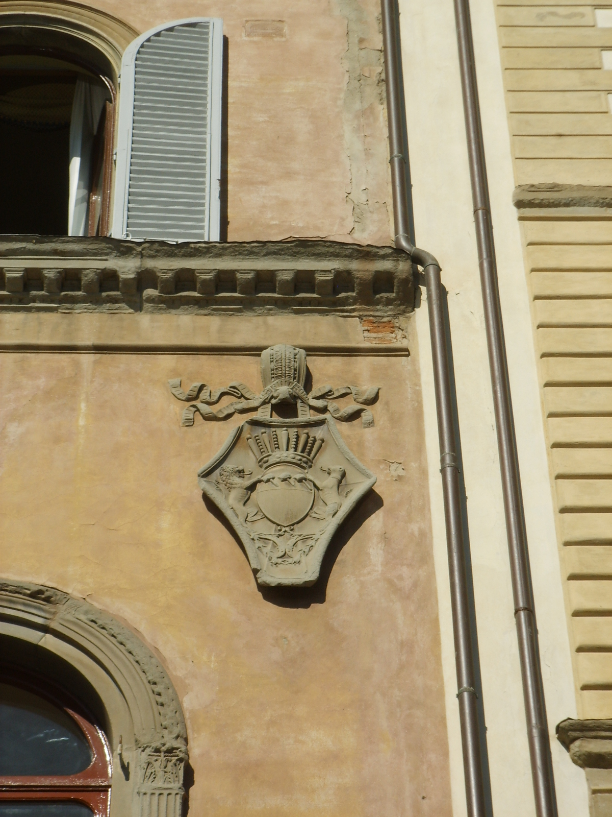 Palazzo gianfilgliazzi 1, stemma